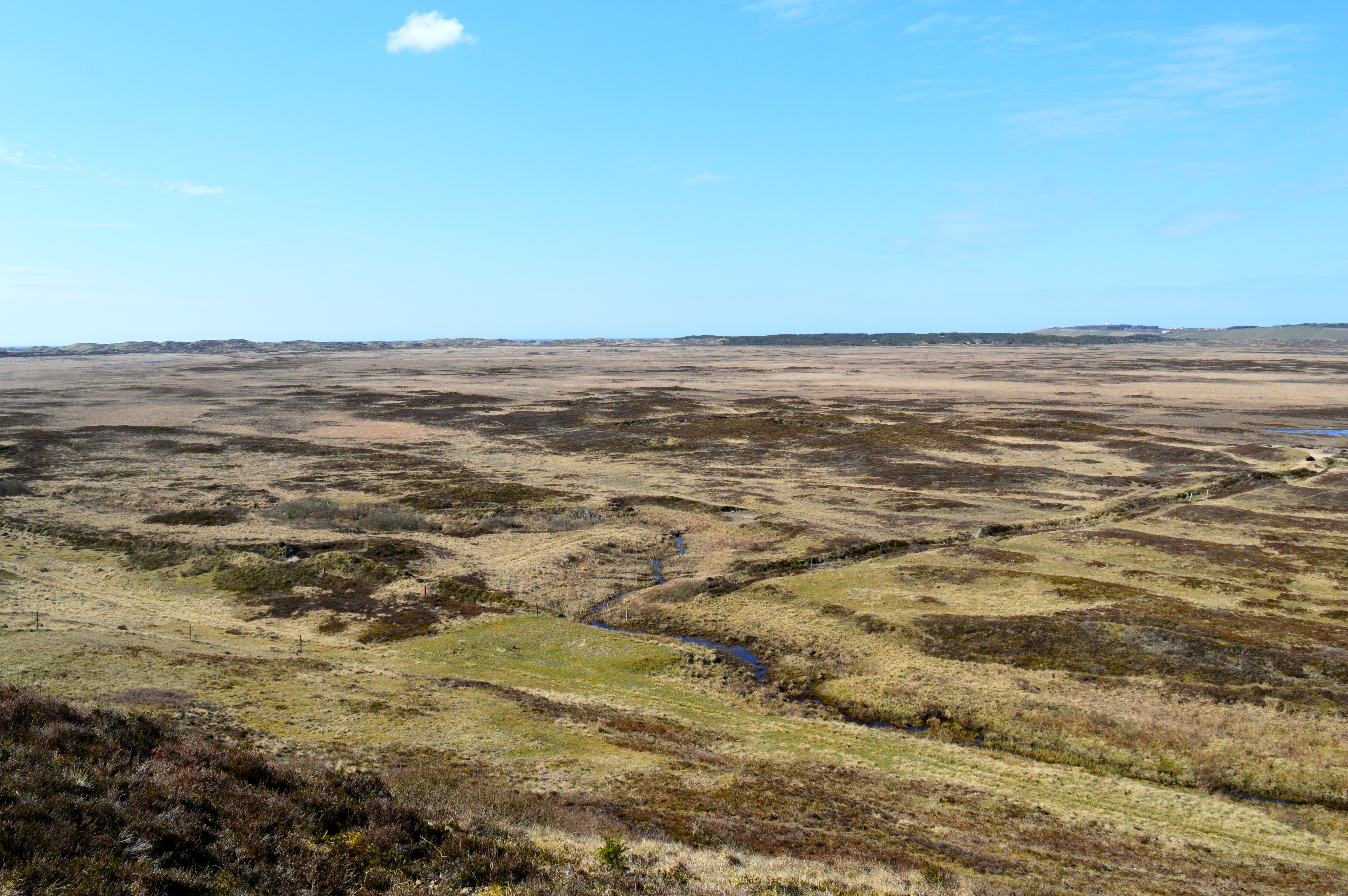 Hanstholm Wildreservat (3)